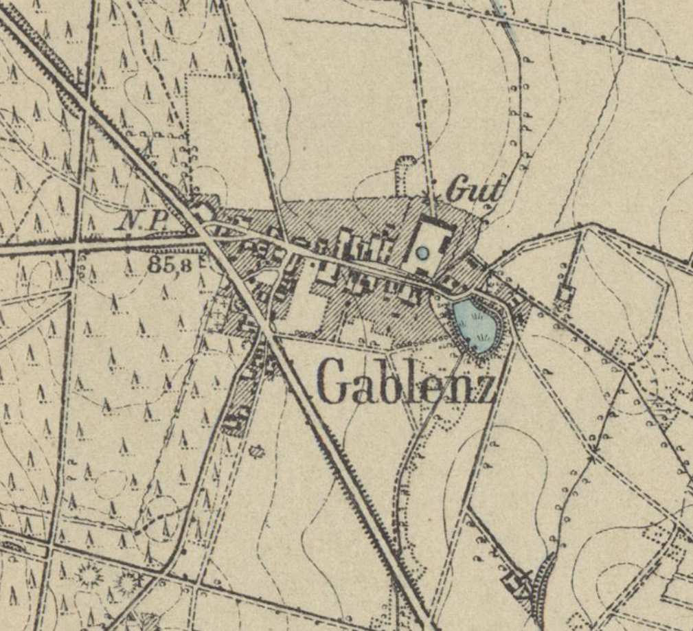 Gablenz, Ortsteil der Gemeinde Neuhausen/Spree, Lkr. Spree-Neiße, Brandenburg, Ausschnitt aus dem Messtischblatt 4353 Döbern von 1919